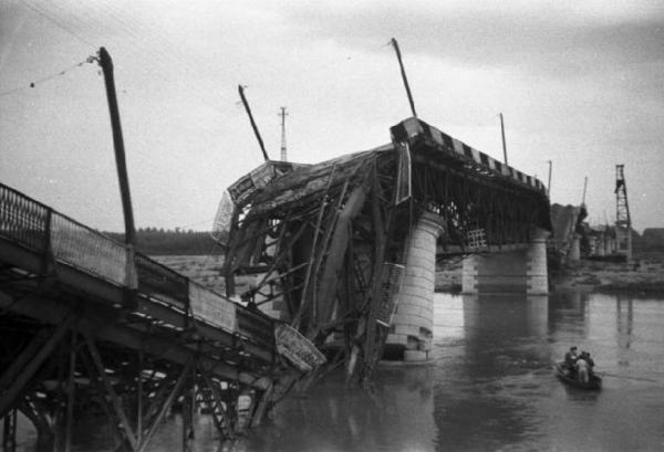 Italia Dopoguerra - Piacenza - Il ponte sul fiume Po distrutto dai bombardamenti